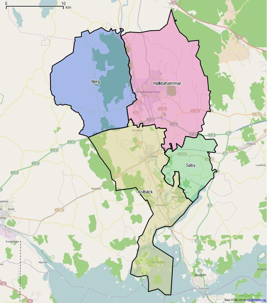 Distriktsindelningen i Hallstahammars kommun